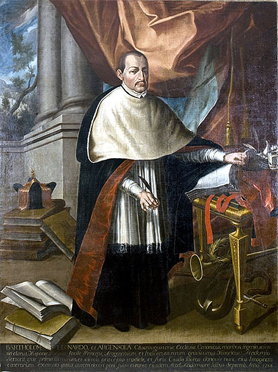 Retrato del eclesiástico, poeta e historiador español Bartolomé Leonardo de Argensola (1562-1631), que aparece de cuerpo entero y vestido de canónigo, con sotana negra, roquete blanco, capa negra y muceta de piel blanca, mientras que su bonete descansa sobre unos libros colocados en una mesa.